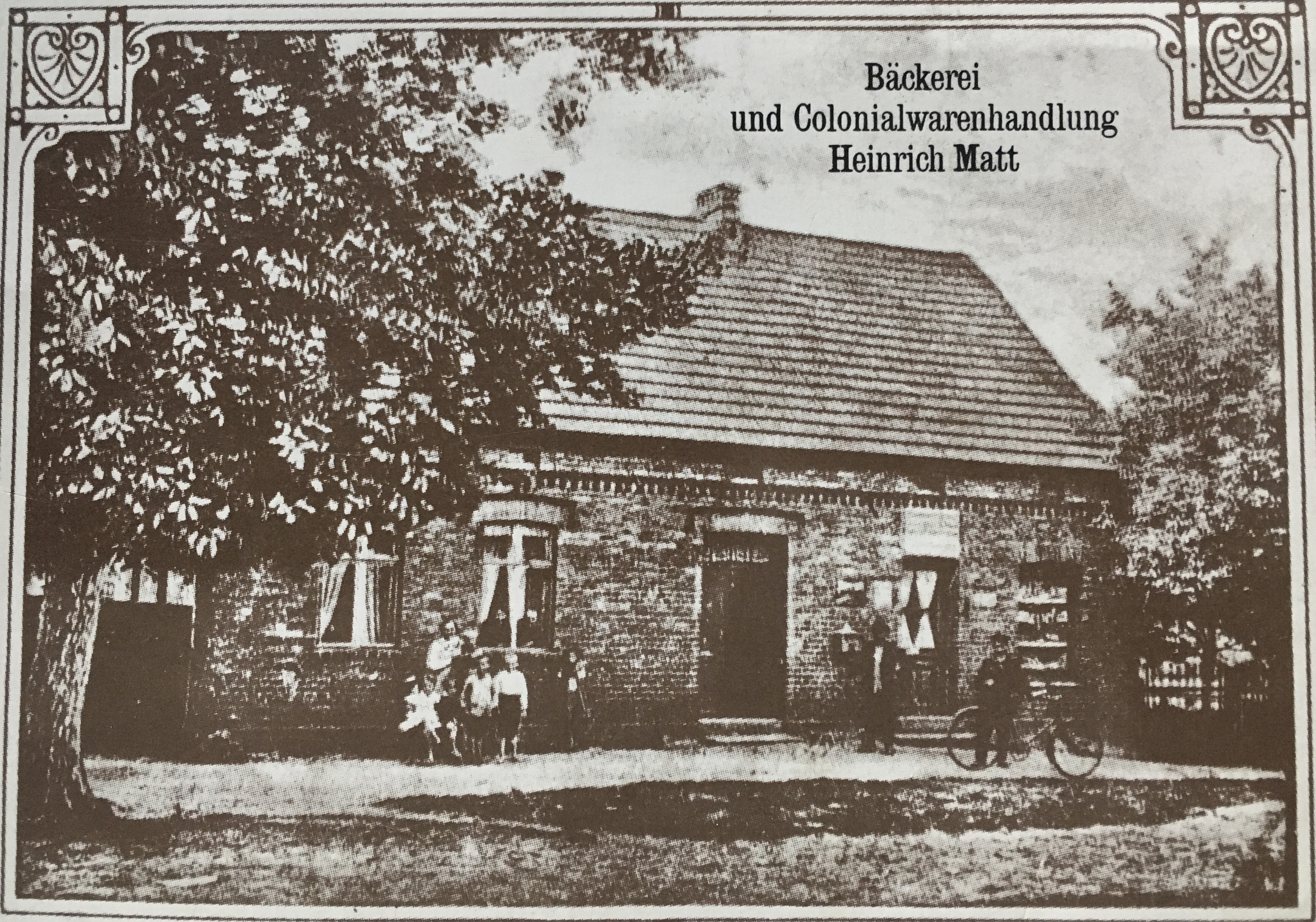 Postkarte Bäckerei und Colonialwarenhandlung Matt